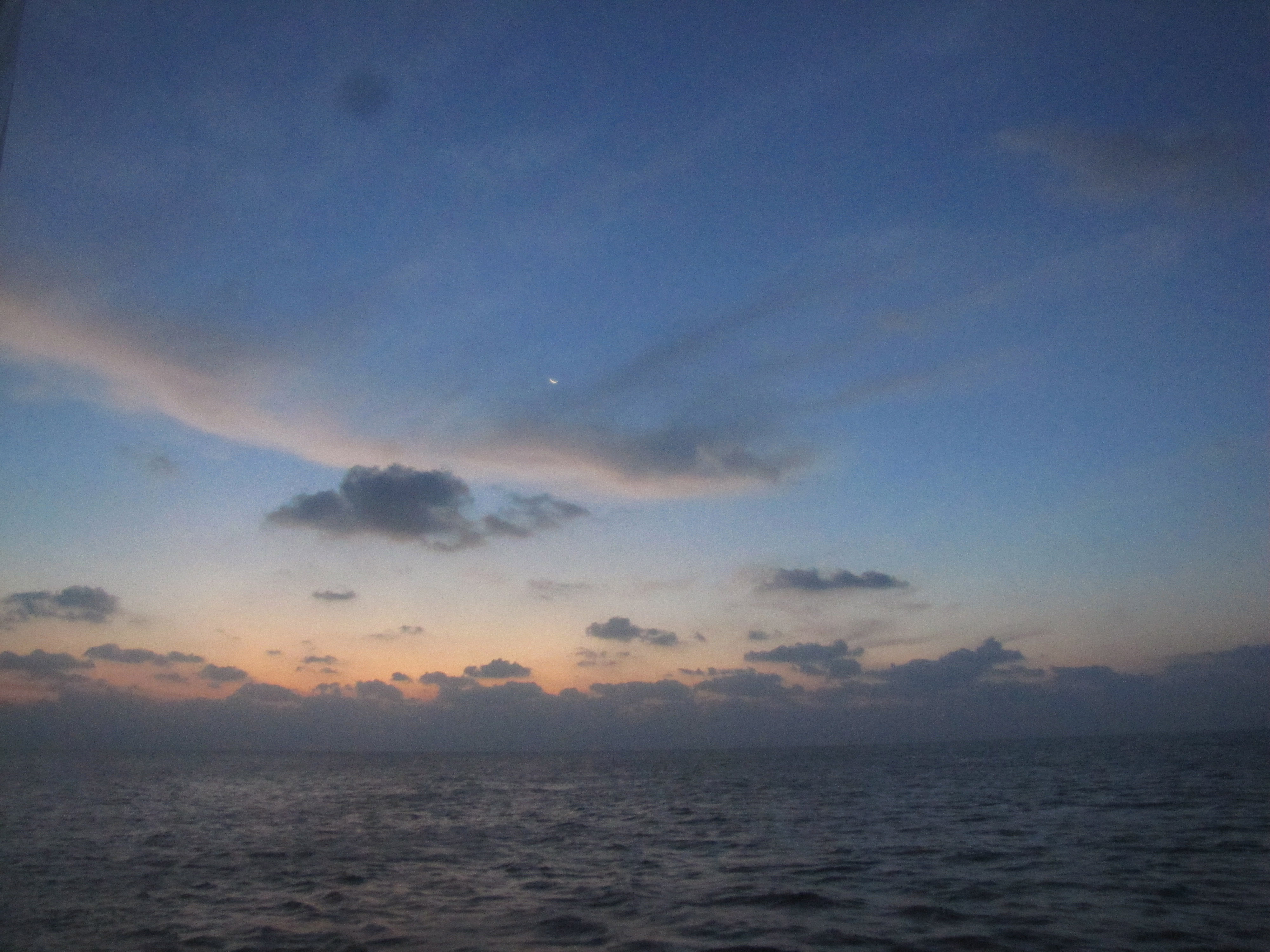 Twilight view from Kalpeni, Lakshadweep, India